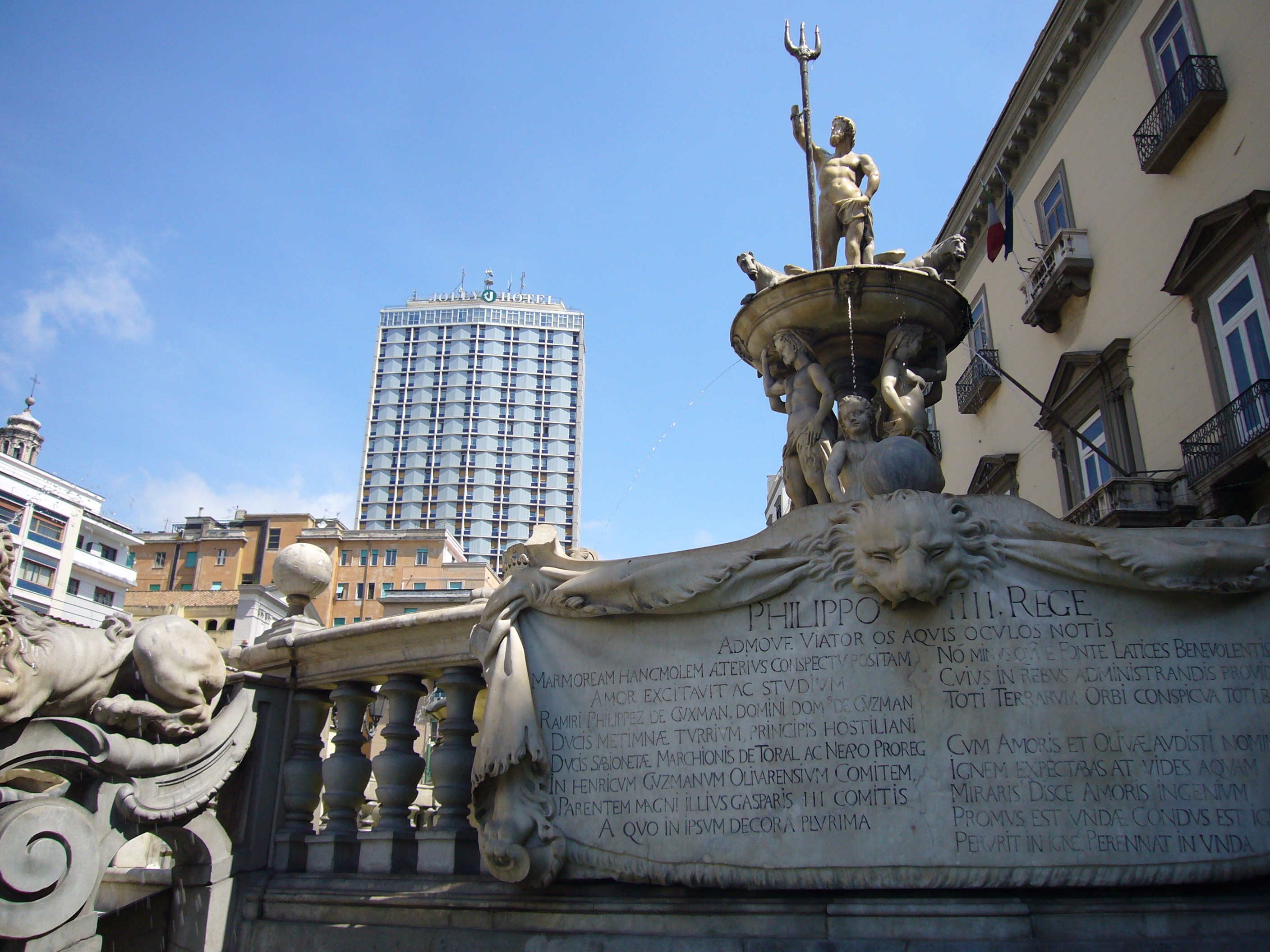 Napoli, Fontana del Nettuno